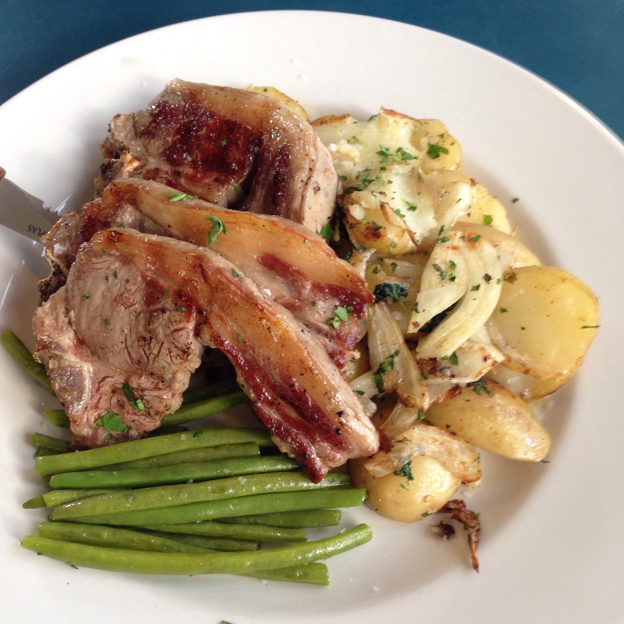 Lamb chops